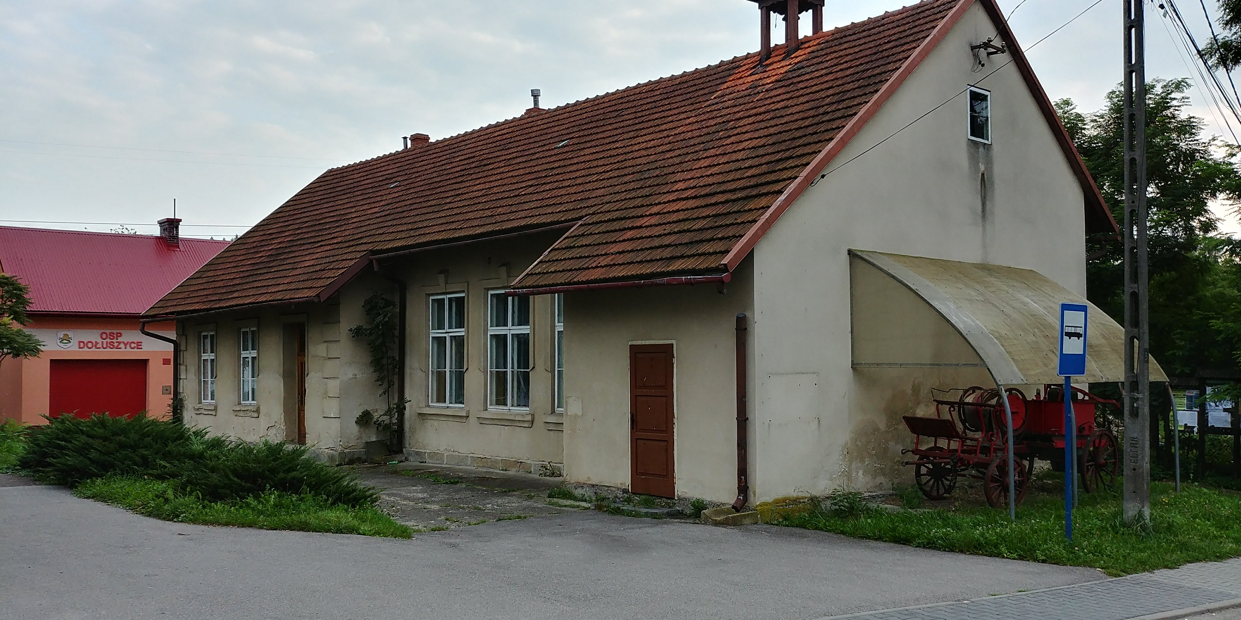 Budynek OSP w Dołuszycach.